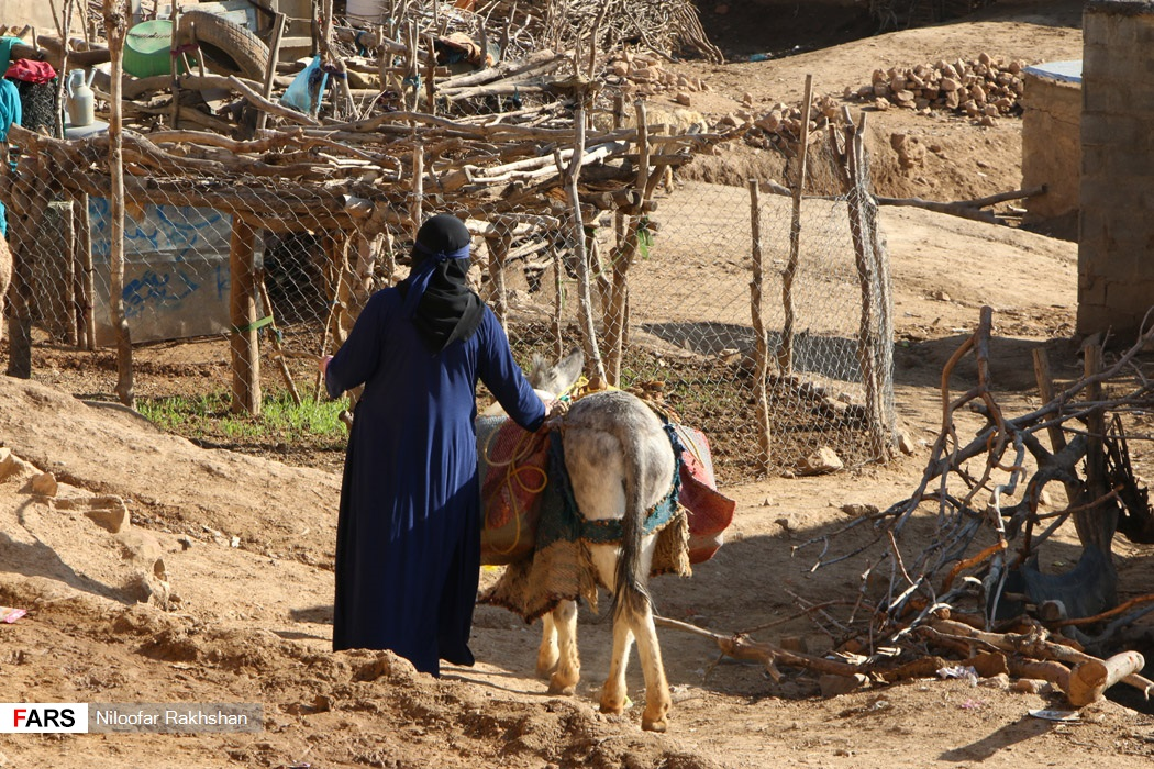 بازفت در استان چهارمحال و بختیاری